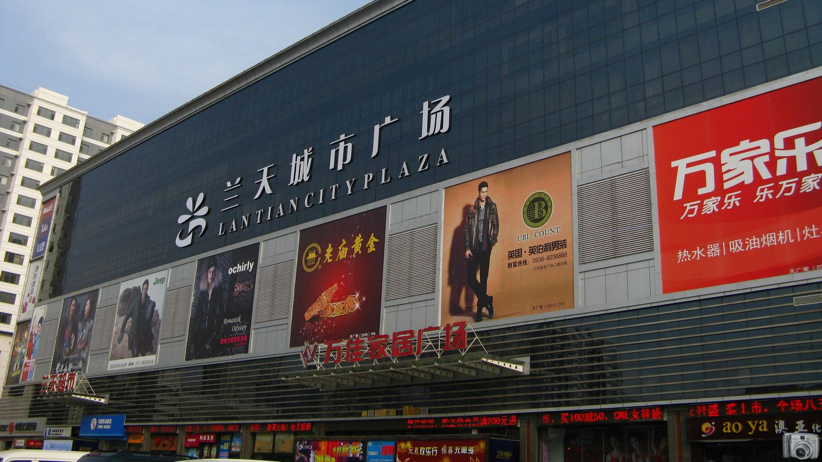 兰天城市广场